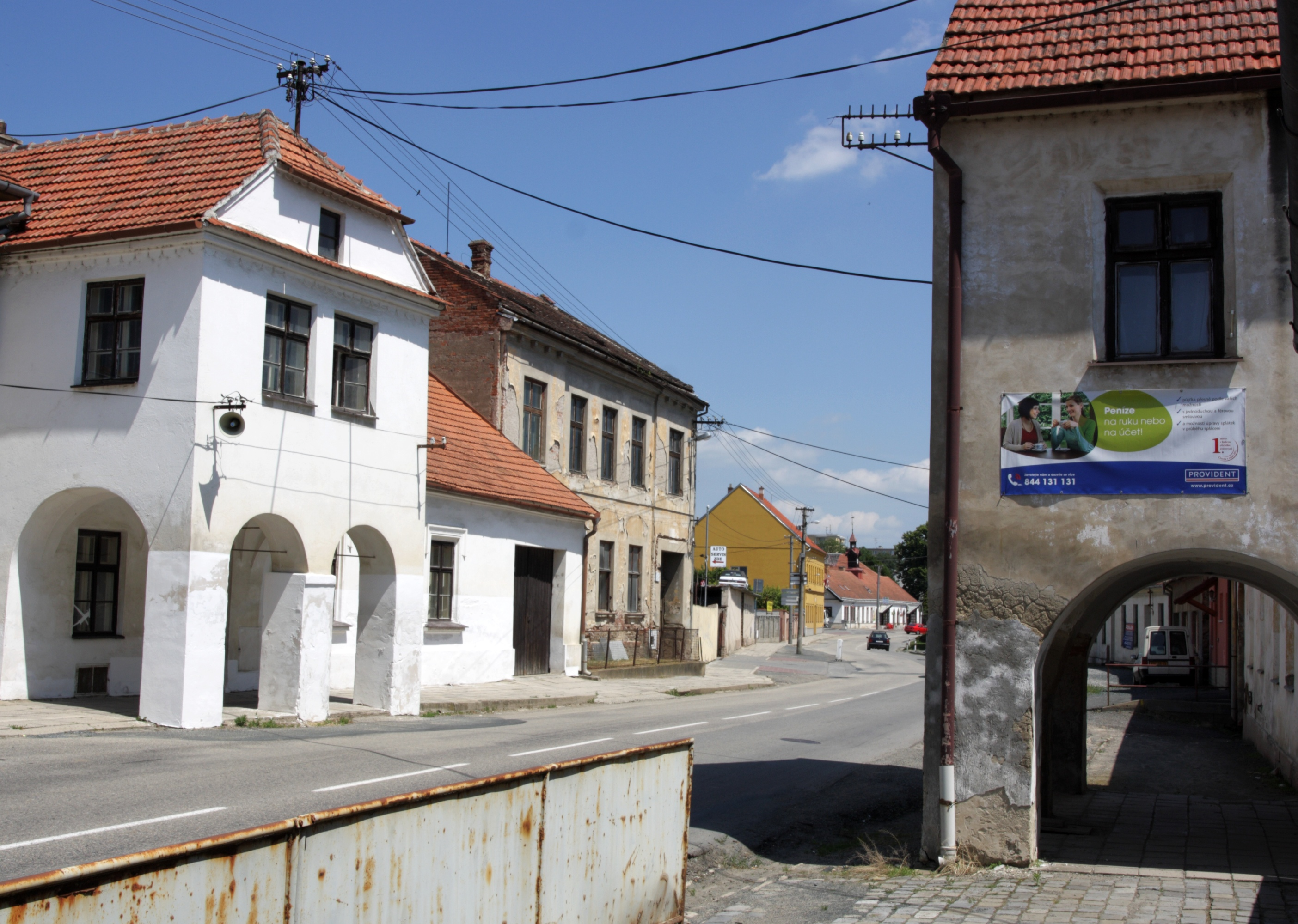 Želešice - městské domy č.p. 23 a 76.